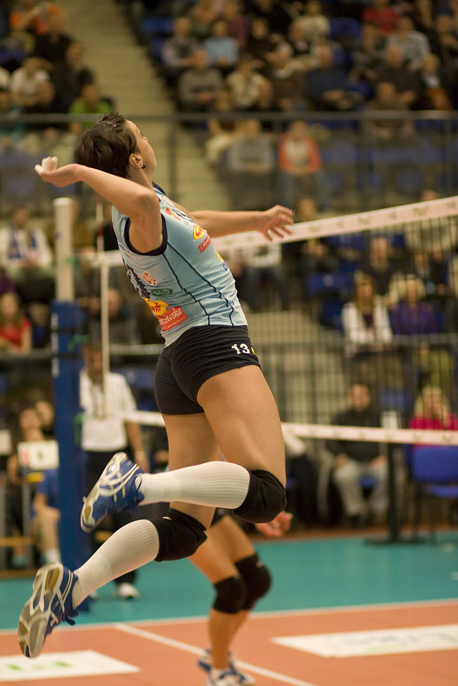 Niemczyk